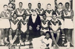 تأسيس النادي الأهلي السعودي